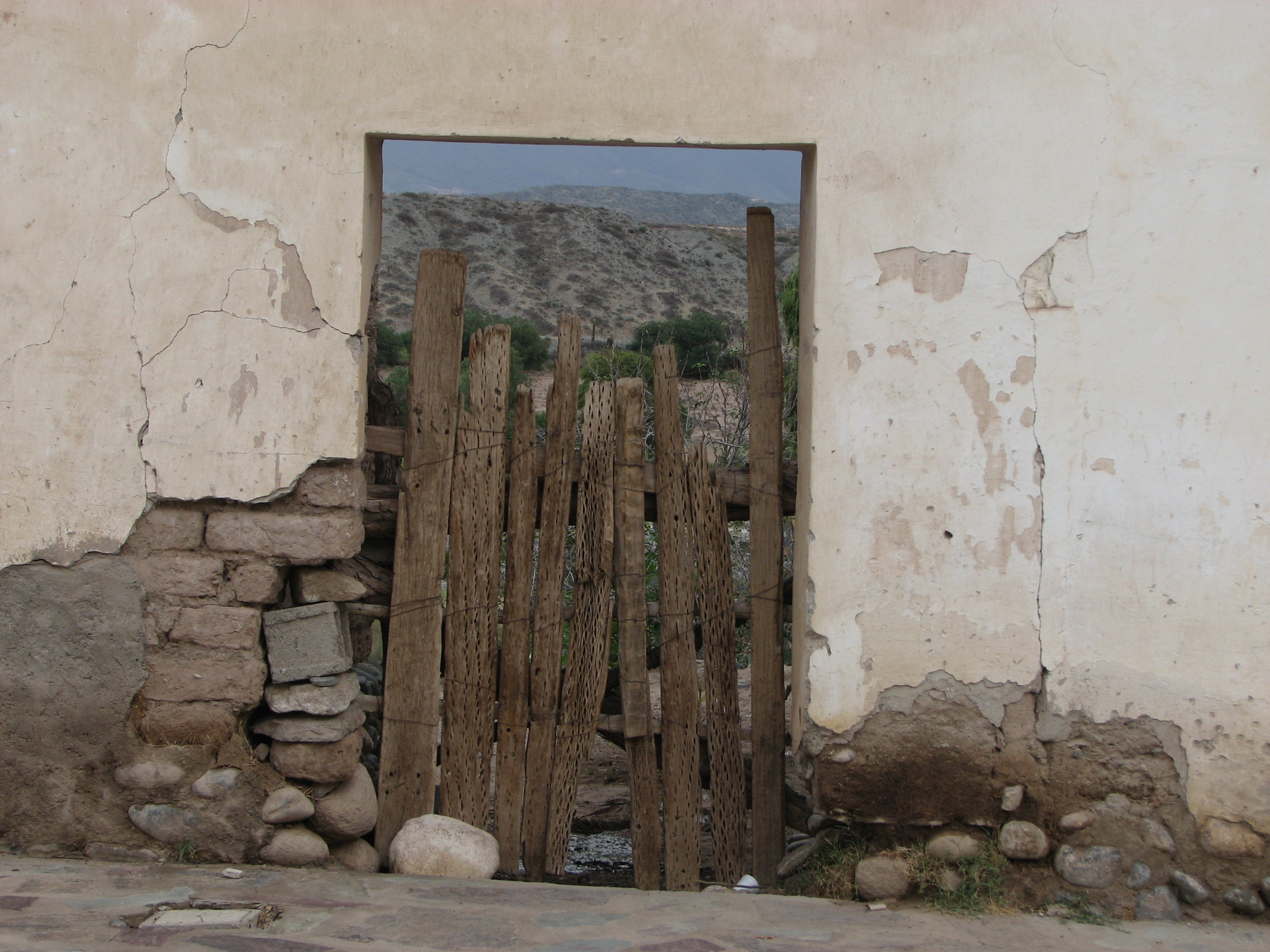 Porte artisanale faite en bois de cactus candélabre (Trichocereus pasacana), à Cachi